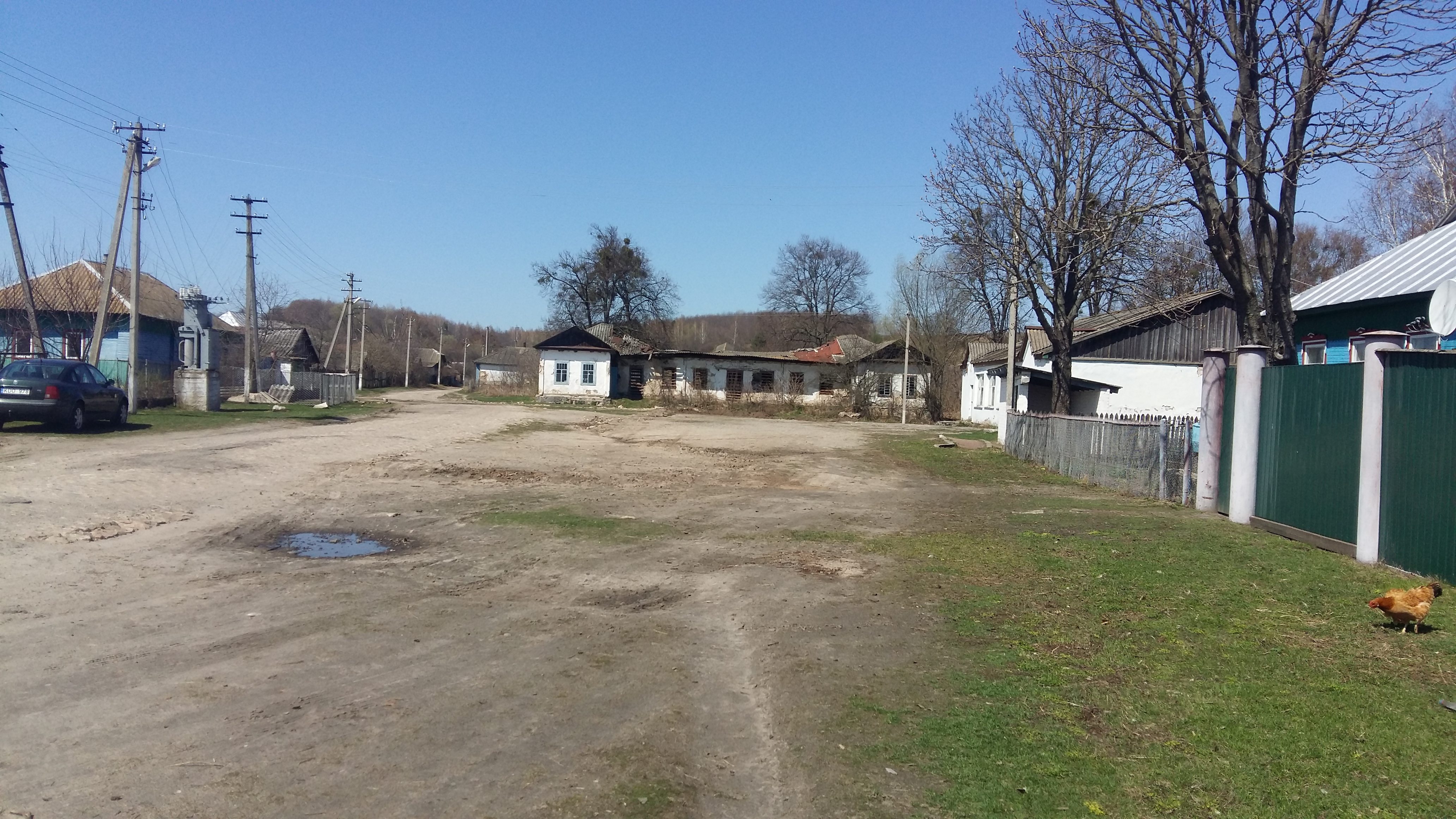 Центр села Викторово